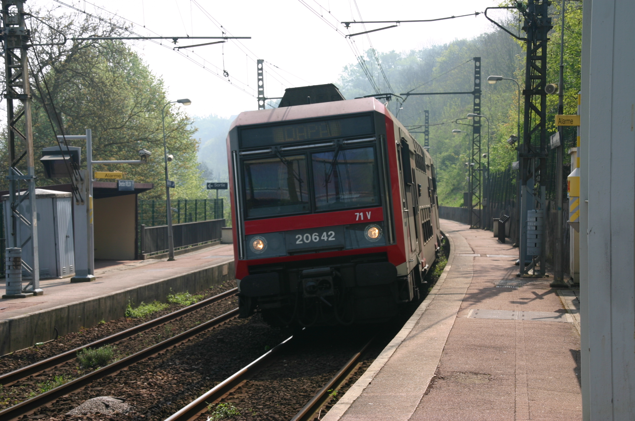 La gare du Plessis-Chenêt, Coudray-Montceaux, département de l'Essonne (France)